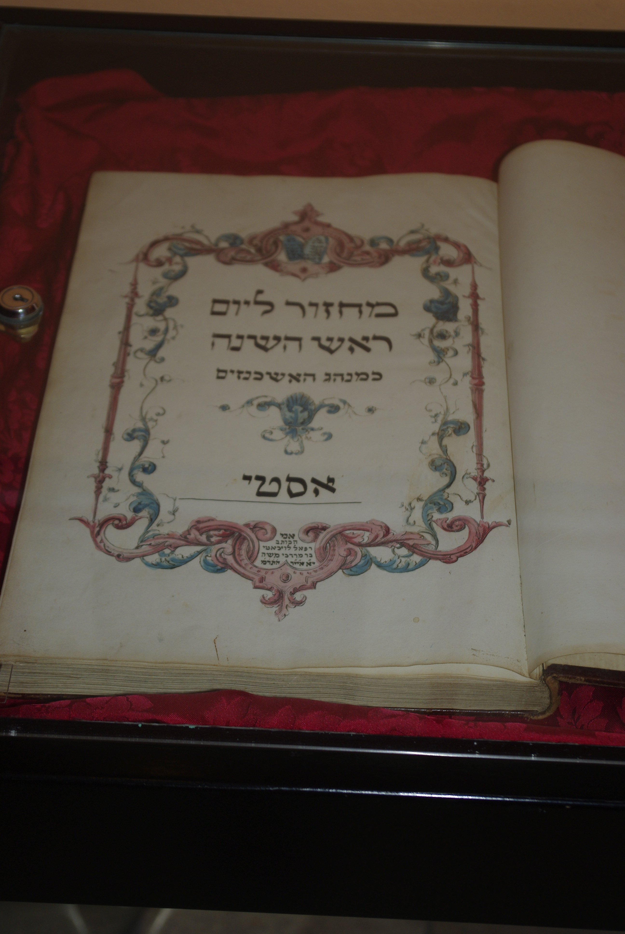 Mahzor de Roch-Hachana, manuscrit, de la synagogue d'Asti de rite ashkénaze (APaM) - Musée de l'argenterie - Casale Monferrato